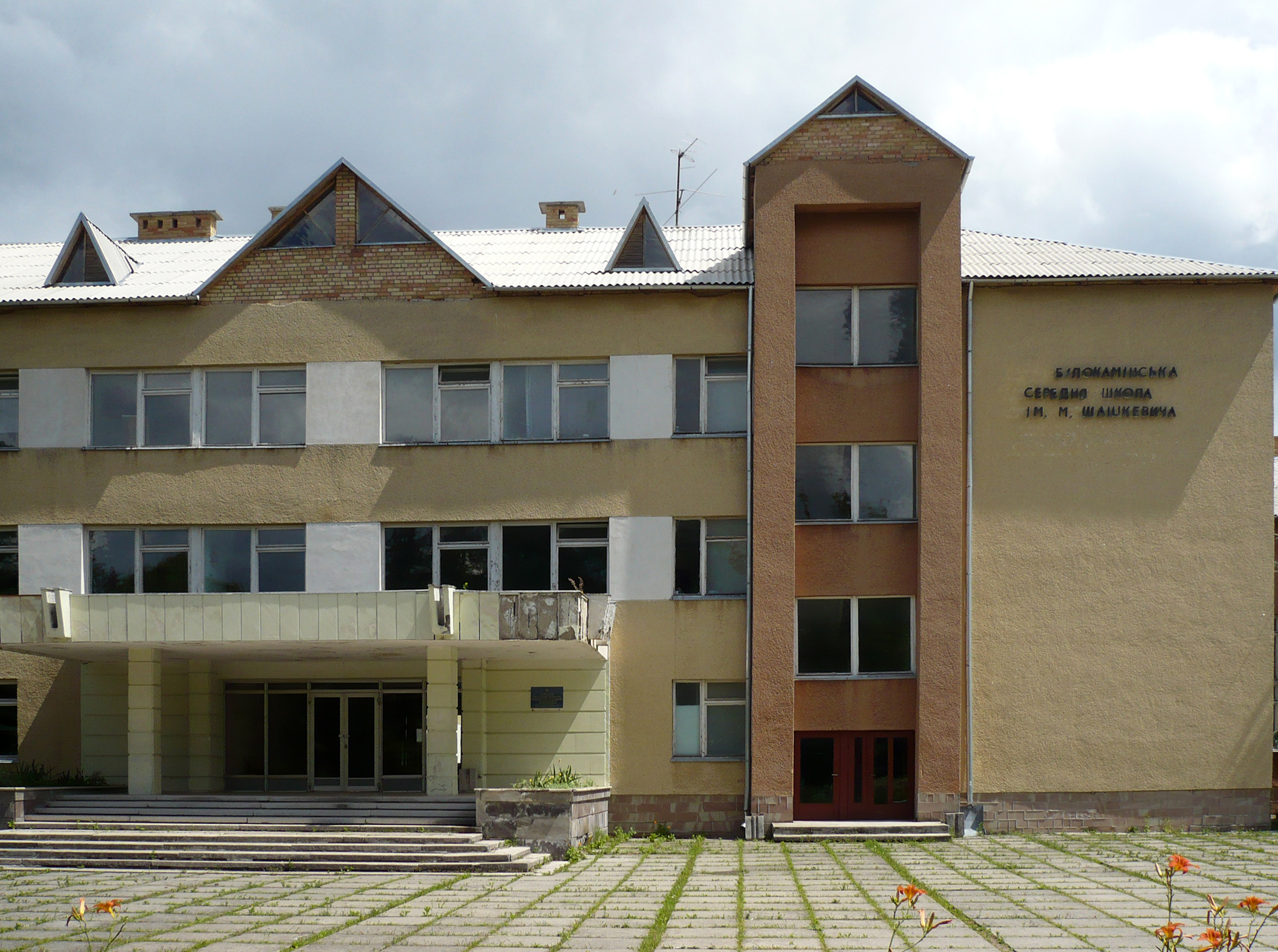 Biały Kamień na Ukrainie - szkoła średnia